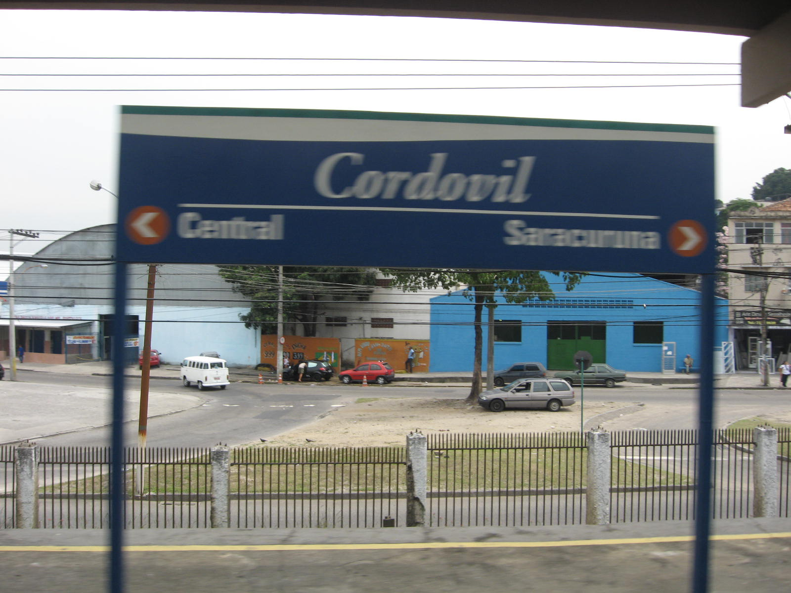 Estação ferroviária de Cordovil.